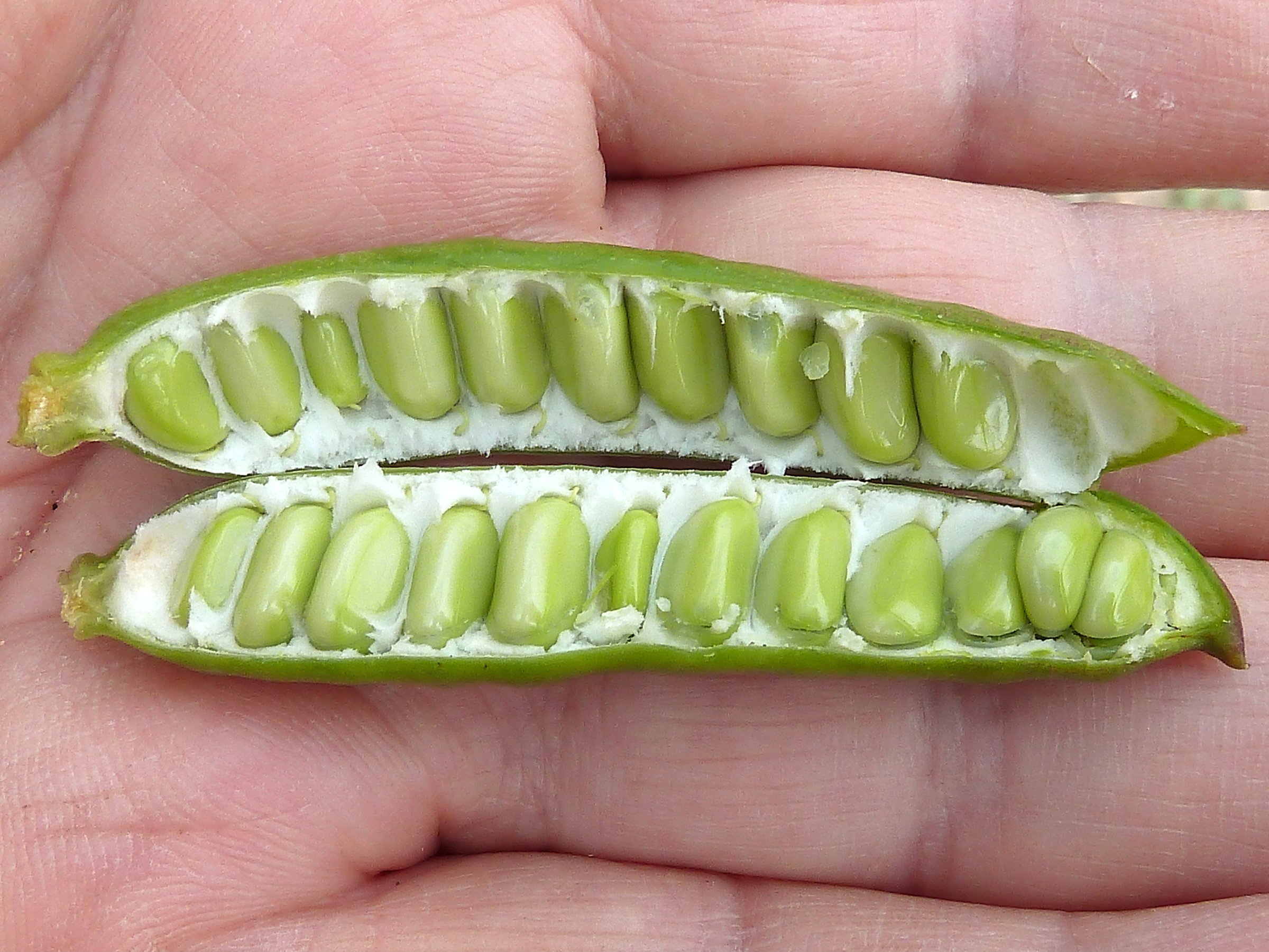 Vachellia farnesisna (Acacia de Indias) - Legumbre inmadura abierta con sus 2 hileras de semillas sumergidas en una pulpa esponjosa - Albatera (Alicante, España)